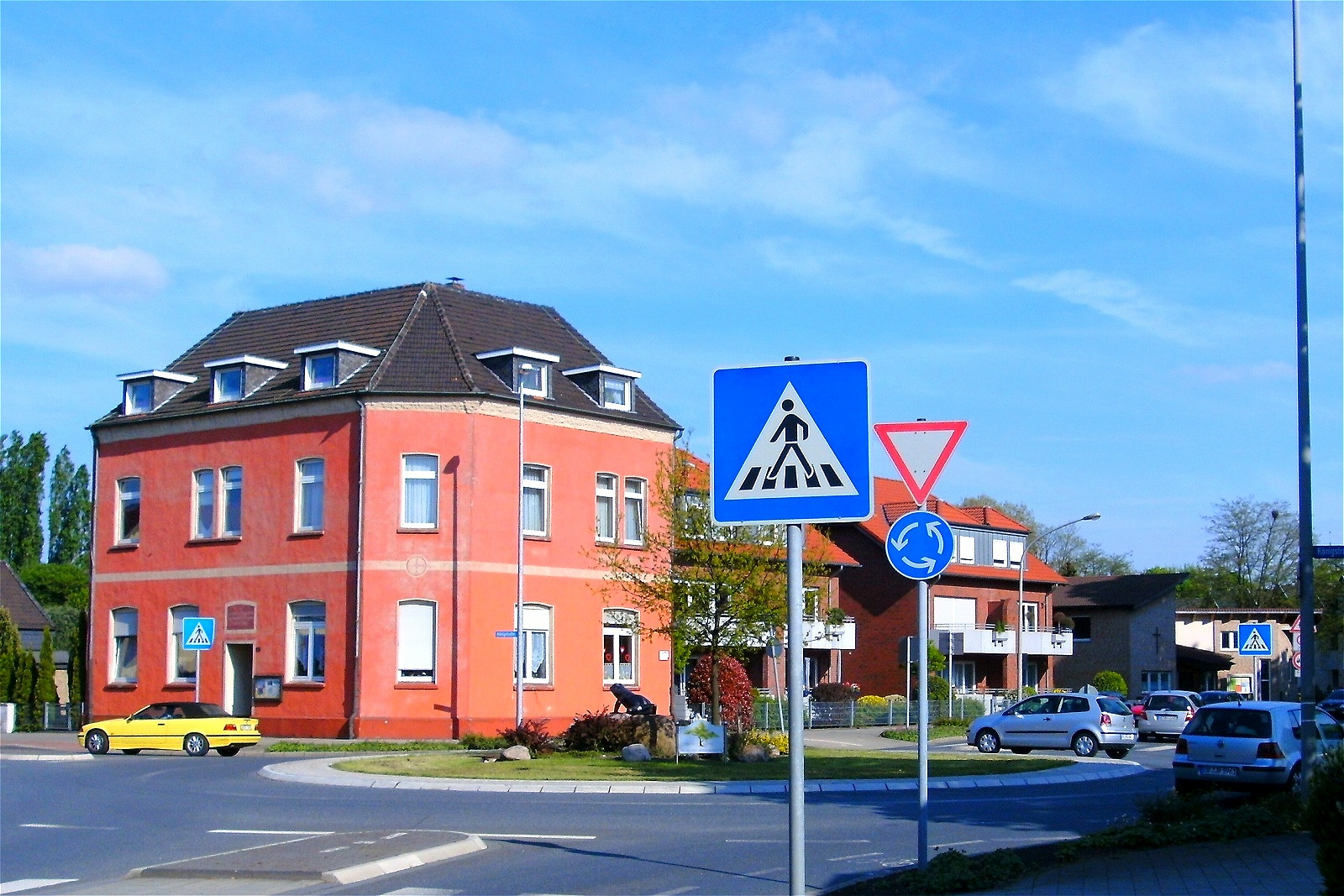 Rathenauplatz in Biefang (Oberhausen, Rhld.)